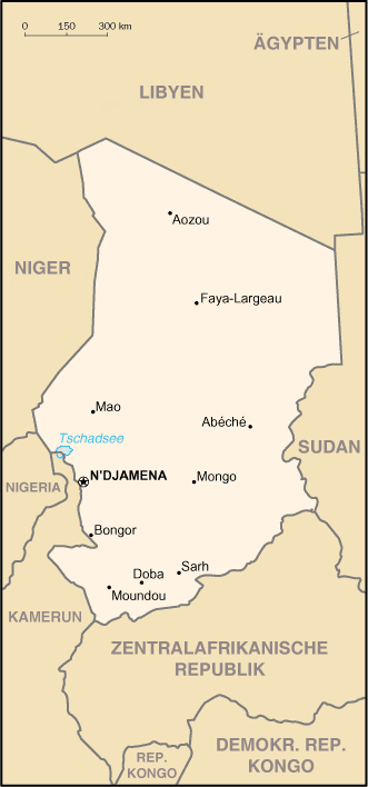 Tschad-Karte deutsch